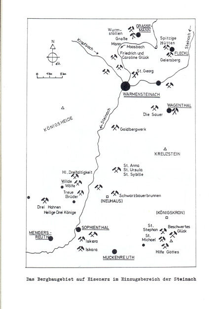 Eisenerzbergbau im oberen Steinachtal